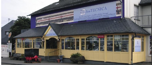 Eingang der ArsTECNICA an der deutsch-belgischen Grenze im deutschen Losheim (Eifel).